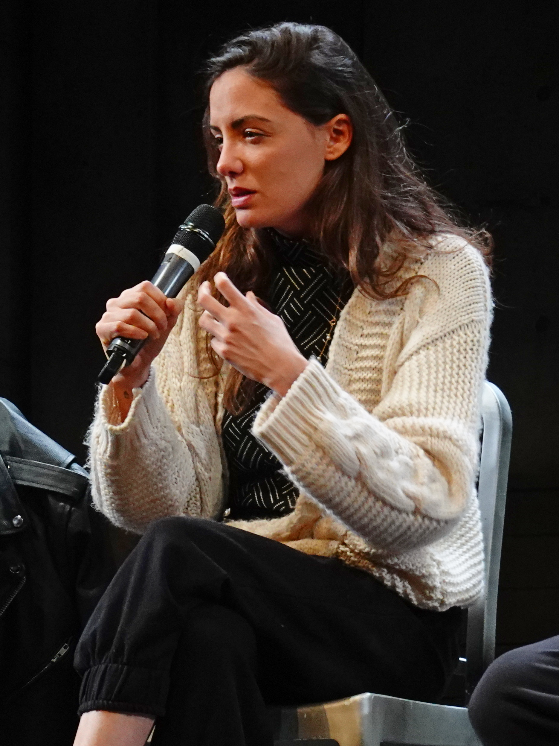 María Hervás durante una de sus intervenciones en el encuentro con el público que tuvo lugar en el Teatro Pavón Kamikaze tras la función de "Jauría" del 14/03/2019.